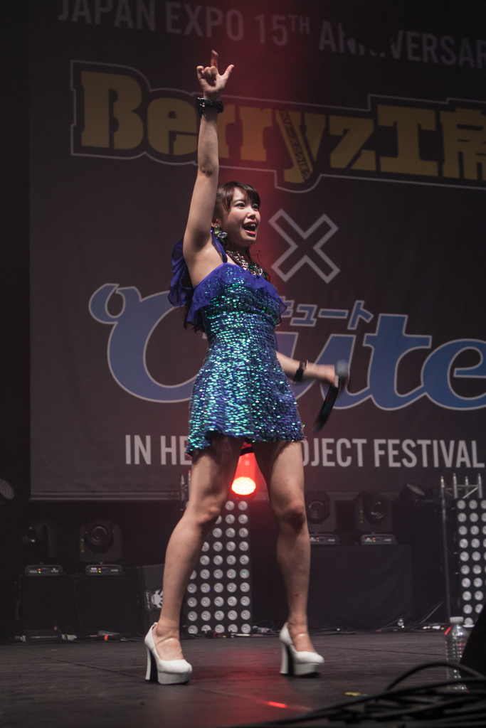 Berryz Kobo x °C-ute